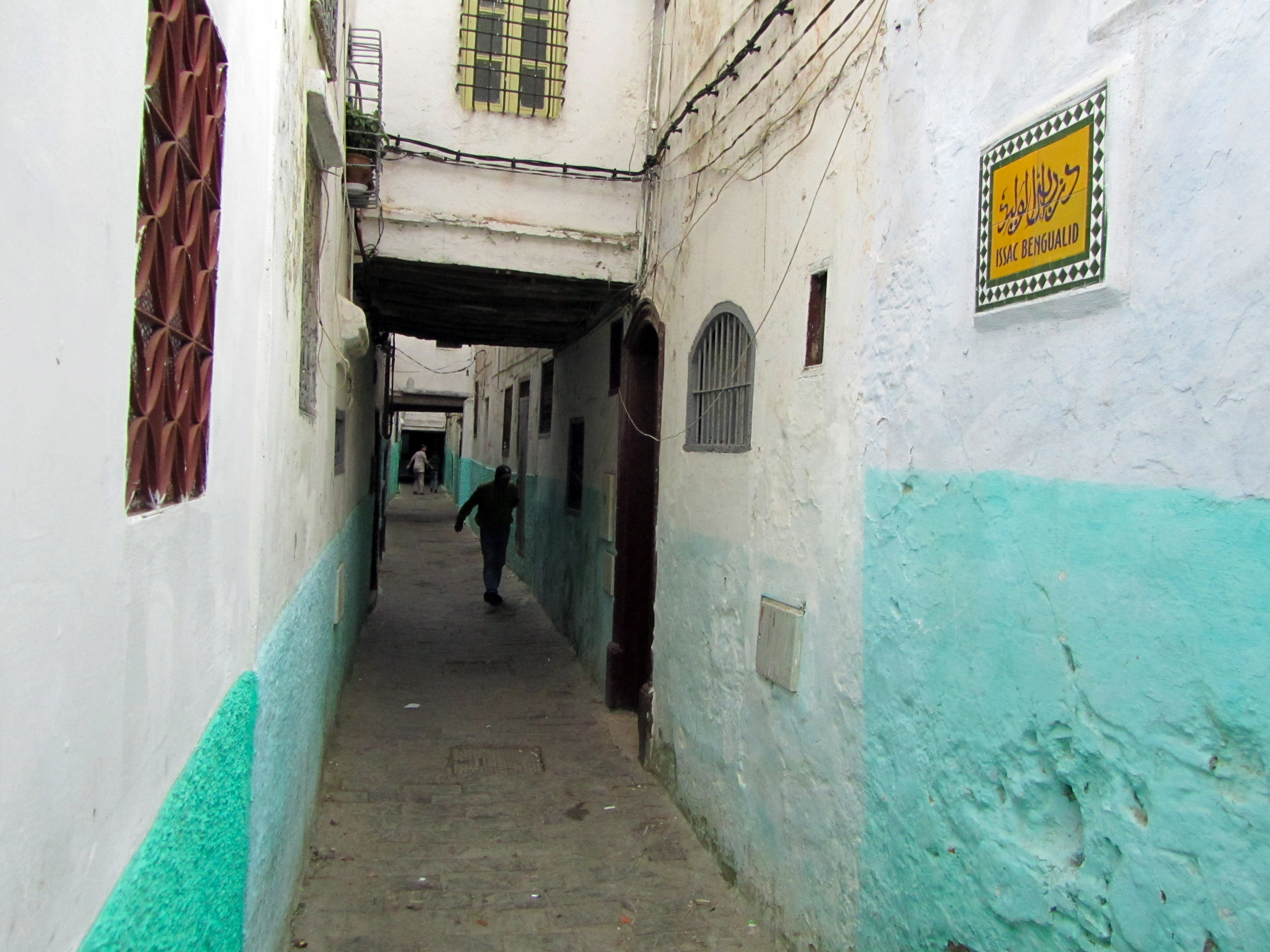 רחוב יצחק בן וואליד על שם רבה של העיר טיטואן